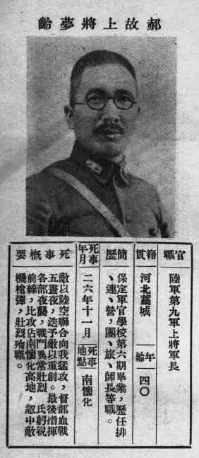 抗戰軍人忠烈錄第一輯中的烈士遺像